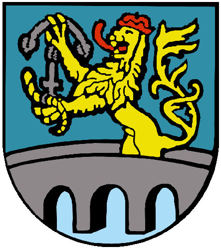 Coat of Arms of Kapfenberg, Austria; Das Wappen - verliehen von Kaiser Ferdinand III. am 15.12.1639 - zeigt die Brücken von Kapfenberg. Das Wappentier - ein Löwe mit Königskrone - hält in den Pranken das Wappen des Hauses Stubenberg, den Anker.